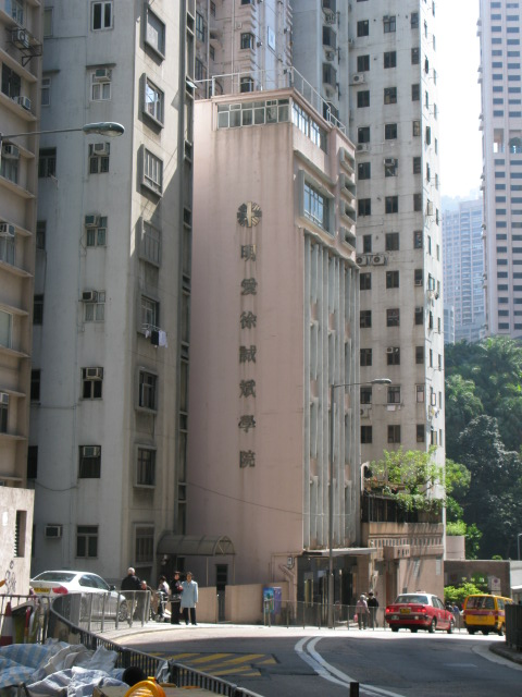 中文（香港）: 香港中環堅道明愛專上學院